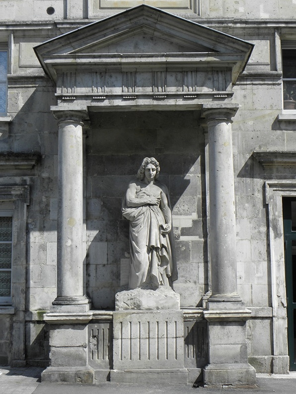 Statue de Jean Racine par David d'Angers à La Ferté-Milon (02).